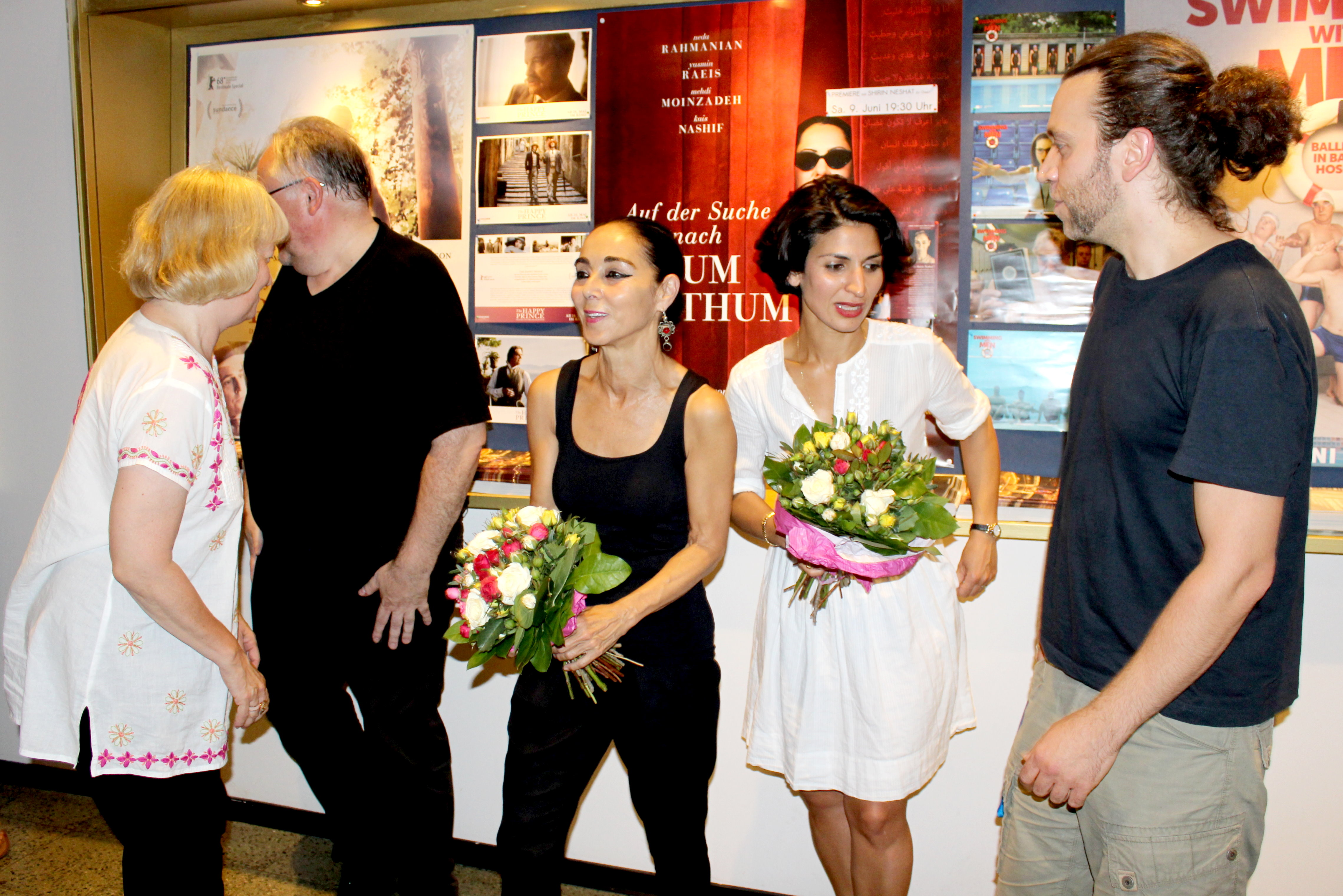 40223 Düsseldorf, Brunnenstraße 20. Filmvorstellung "Auf der Suche nach Oum Kulthum" im Metropol-Filmkunstkino. V.l.n.r.: Anne Wotschke (Kinobetreiberin), Kalle Somnitz (Kinobetreiber), Shirin Neshat (Regisseurin), Neda Rahmanian (Schauspielerin), Daniel Bäldle (Theaterleiter). Aufnahme von 2018.